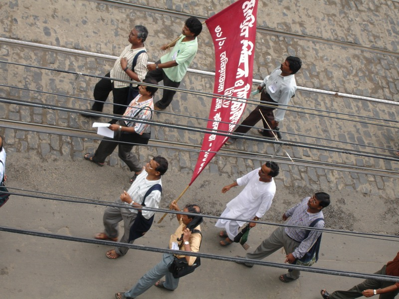 Popis: Strajk v meste Kalkata Zdroj: Dátum: júl 2005 Autor: redaktor: ham Povolenie: GFDL Iné verzie tohto súboru